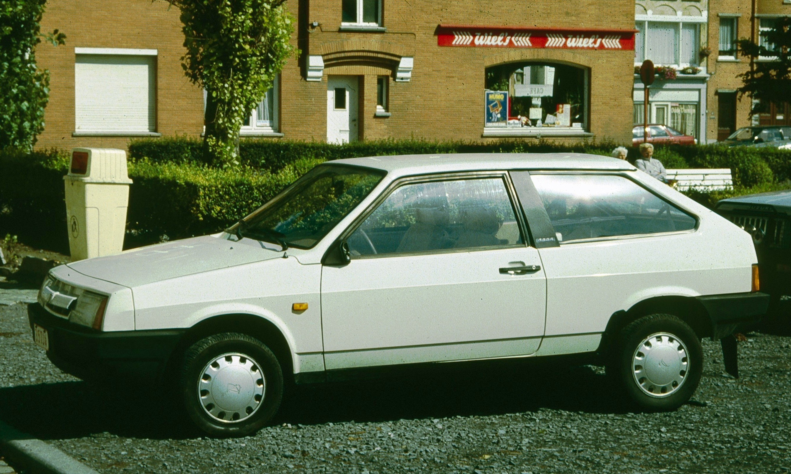 Lada Samara Profile